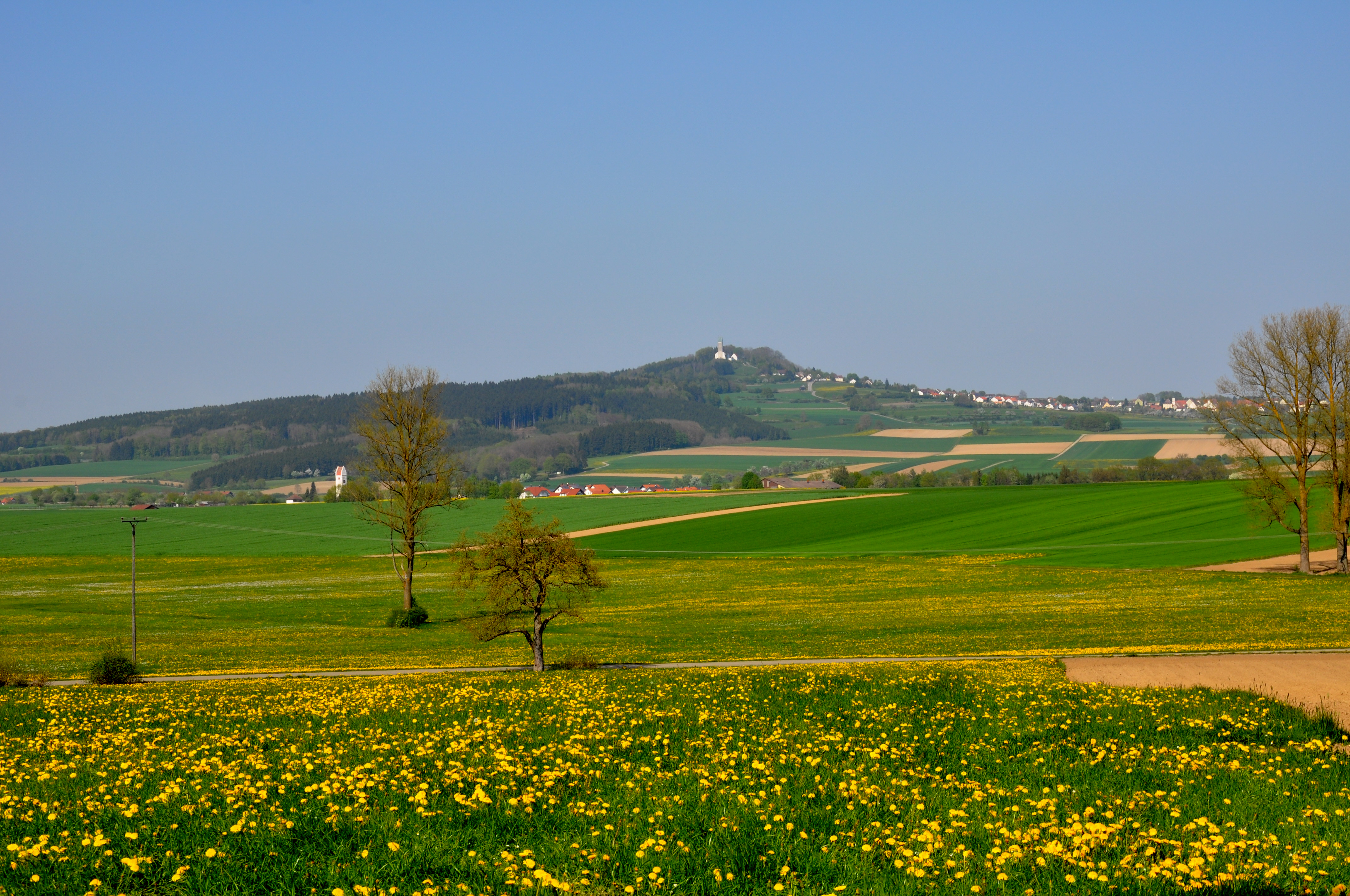 Blick von Heudorf, Gemeinde Dürmentingen, zum Bussen